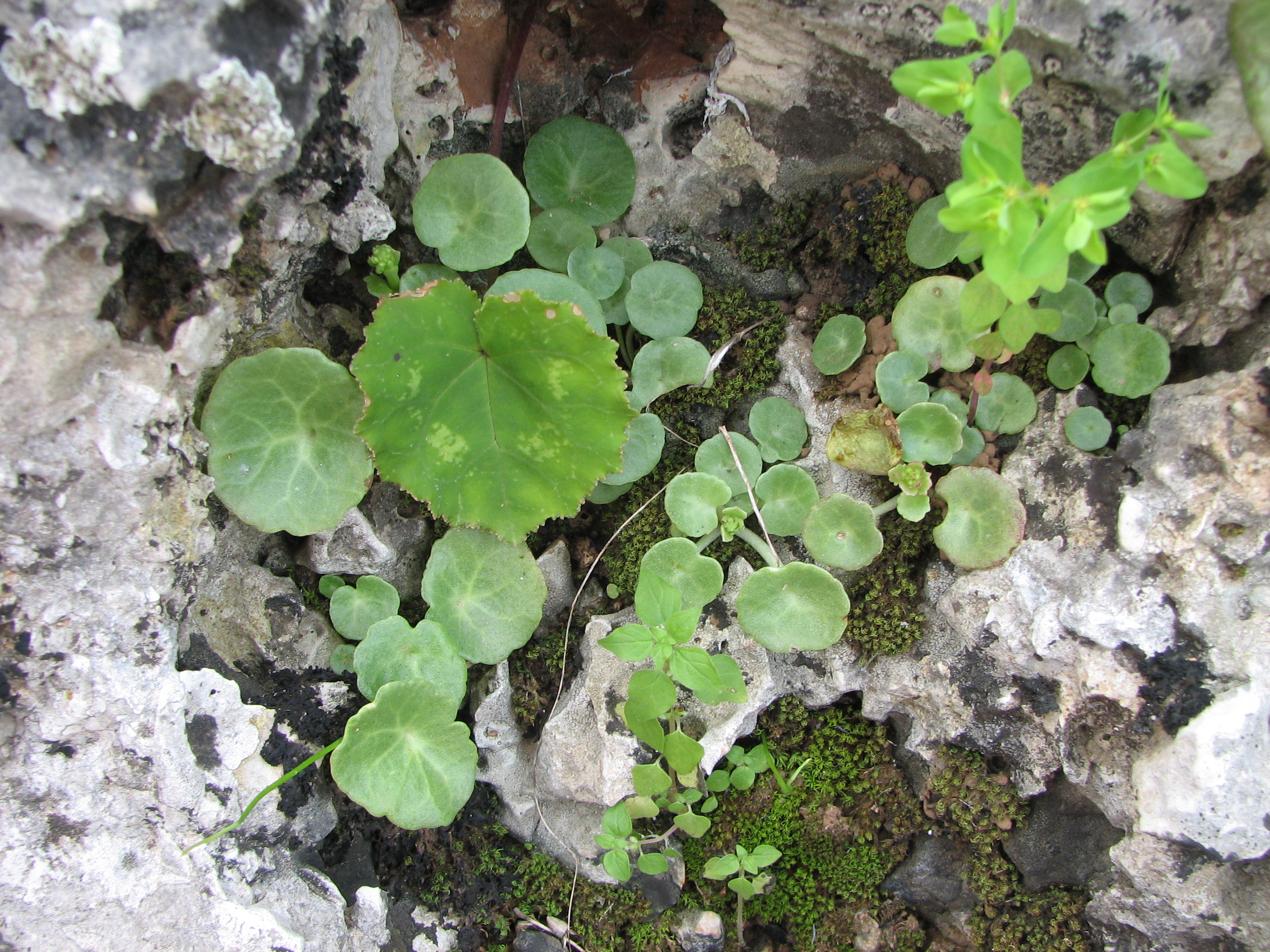 Green Paths, between Nesher - Yagur on Mount Carmel Israel. View from the path השביל הירוק בין העיר נשר וקיבוץ יגור, על הצלע הצפונית של הר הכרמל. מראות על השביל